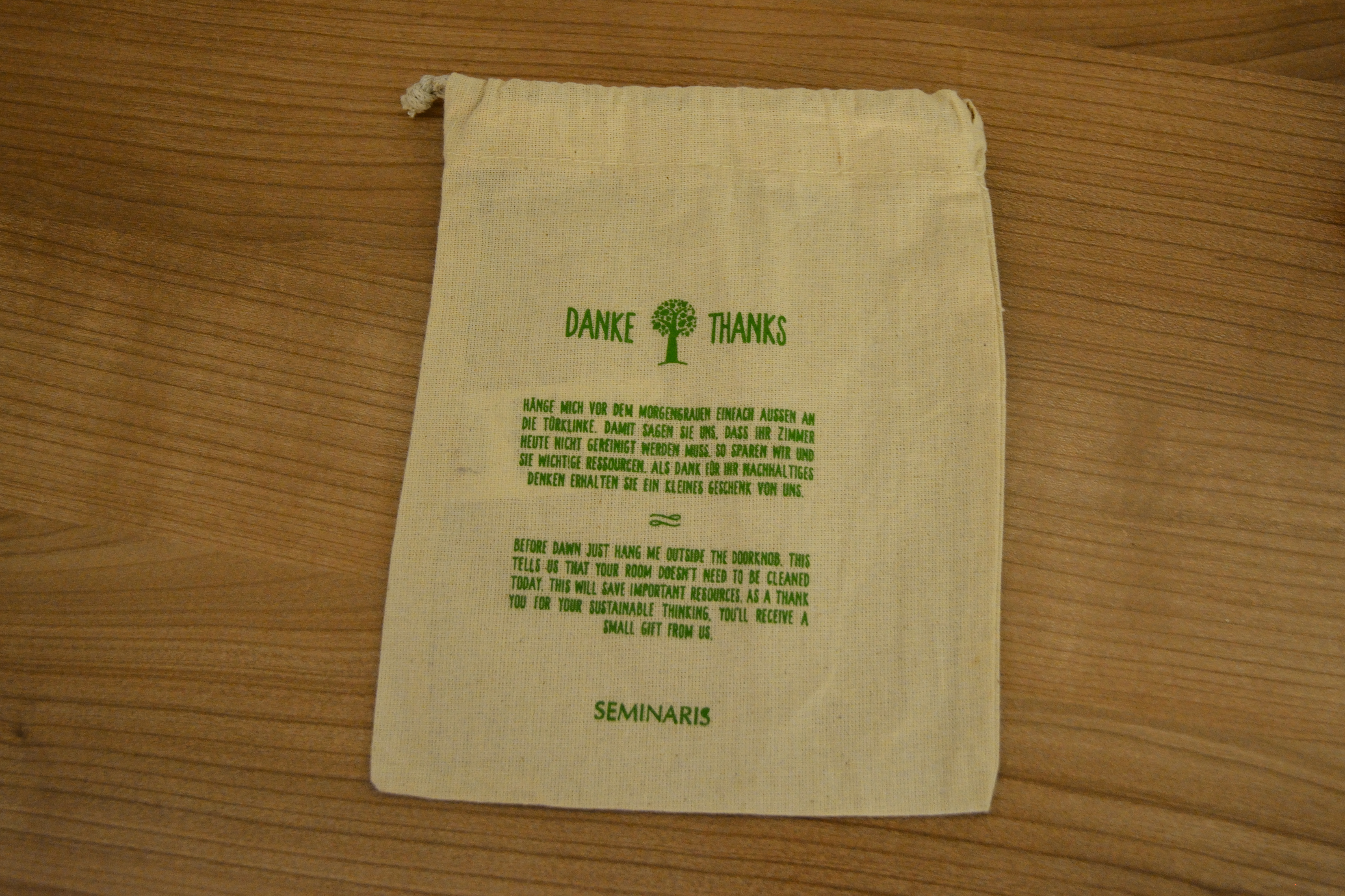 Impressionen aus dem Museum Europäischer Kulturen in BerlinHier: Nachhaltigkeit: Verzicht auf die Reinigung der Nasszelle und des Staubsaugers in einem Hotel. Wäre bei zwei Übernachtungen sowieso überflüssig.